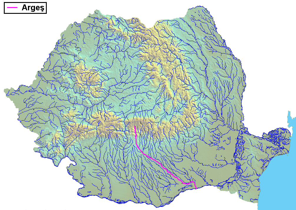 Raul Arges